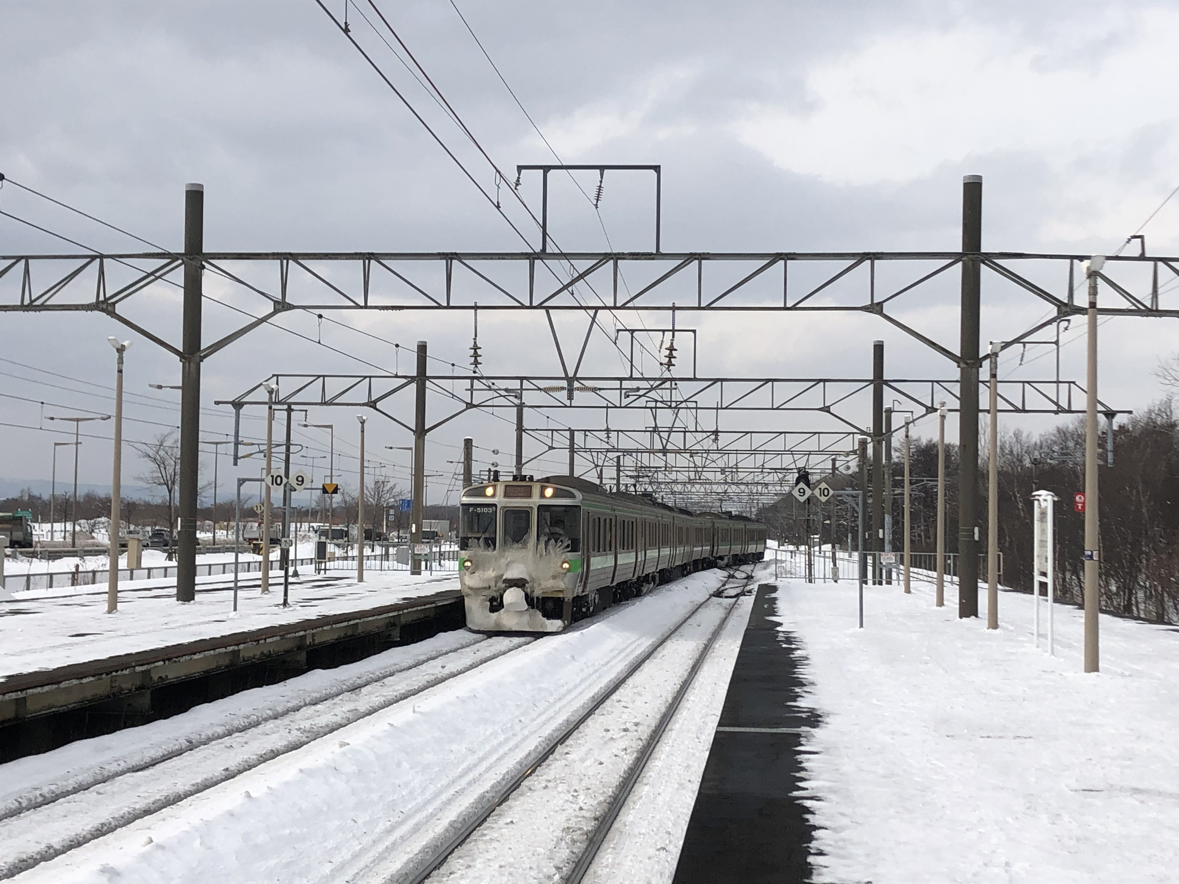 南千歳駅の3番線に進入する快速「エアポート136号」新千歳空港行。2019年2月15日撮影。